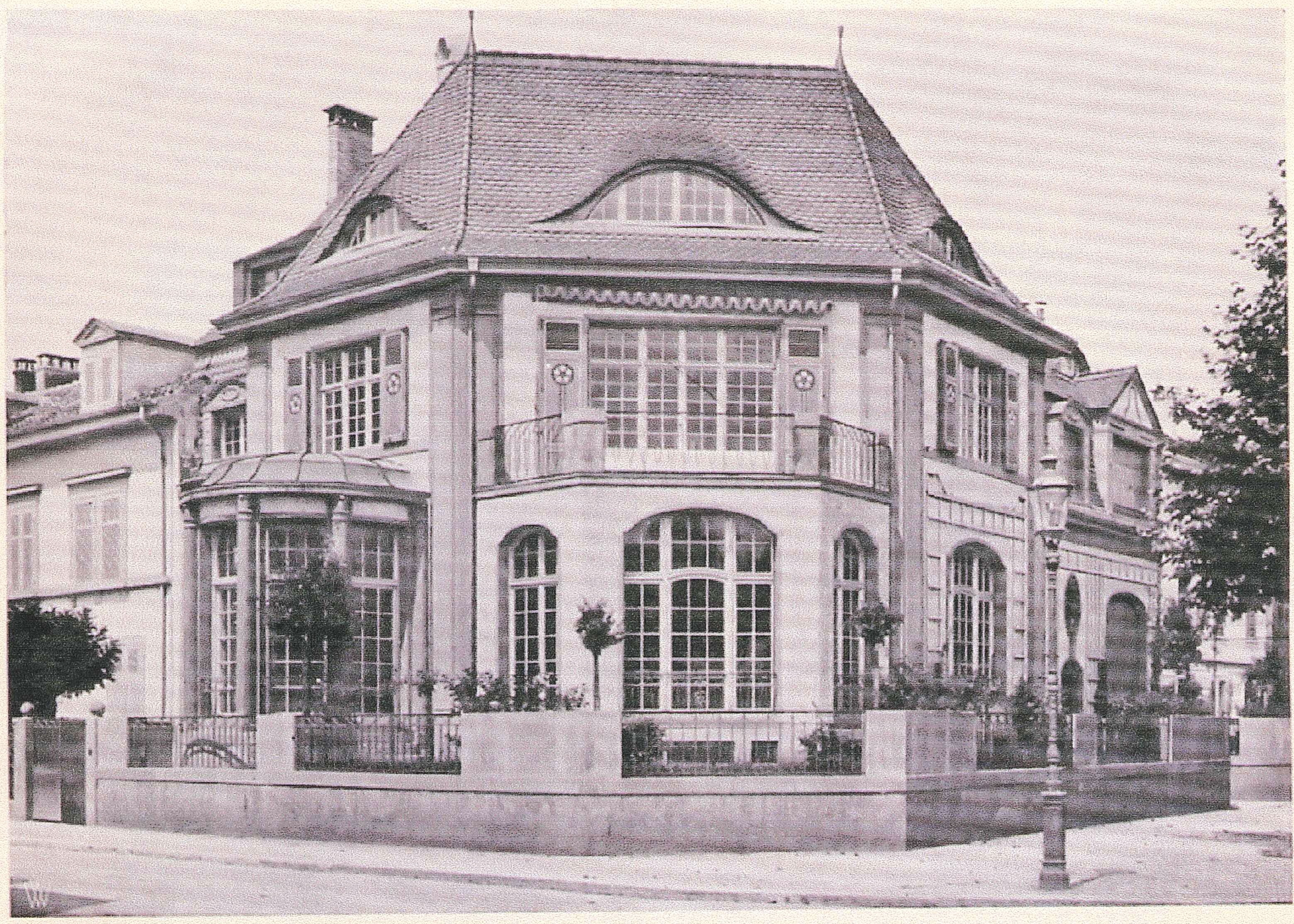 Einfamilienhäuser am Spalenring. Grundrisse S. 56 und 67. Architekt Rudolf Linder in Basel.